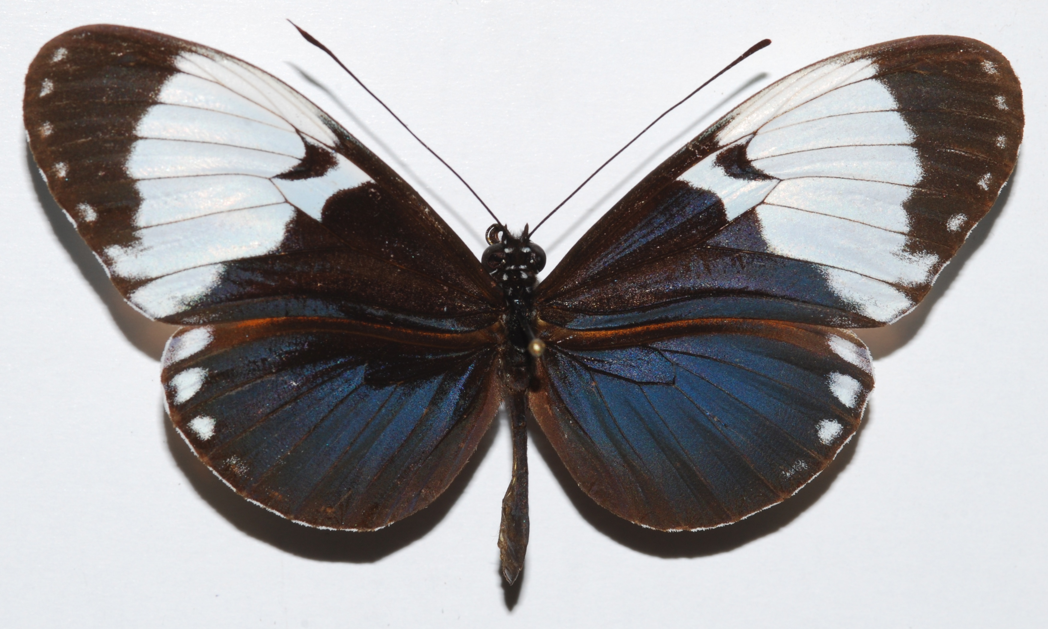 Guapiles, COSTA RICA